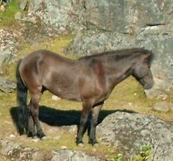 Gotlandsruss. Bilden tagen i Slottsskogen, Göteborg av Dennis Björklund 28 juni 2005 kl.07.55 (CEST).